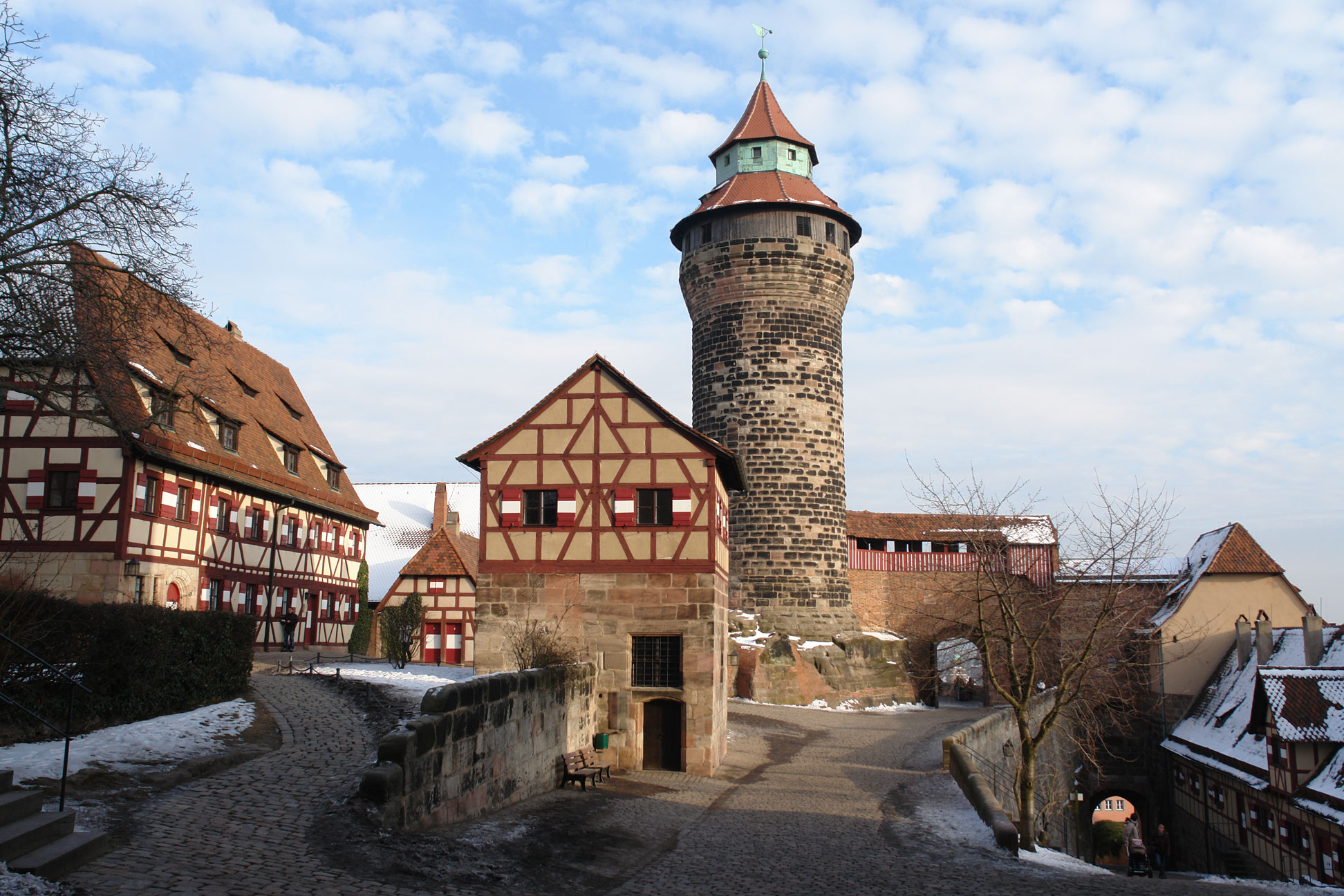 Nuremberg Castle